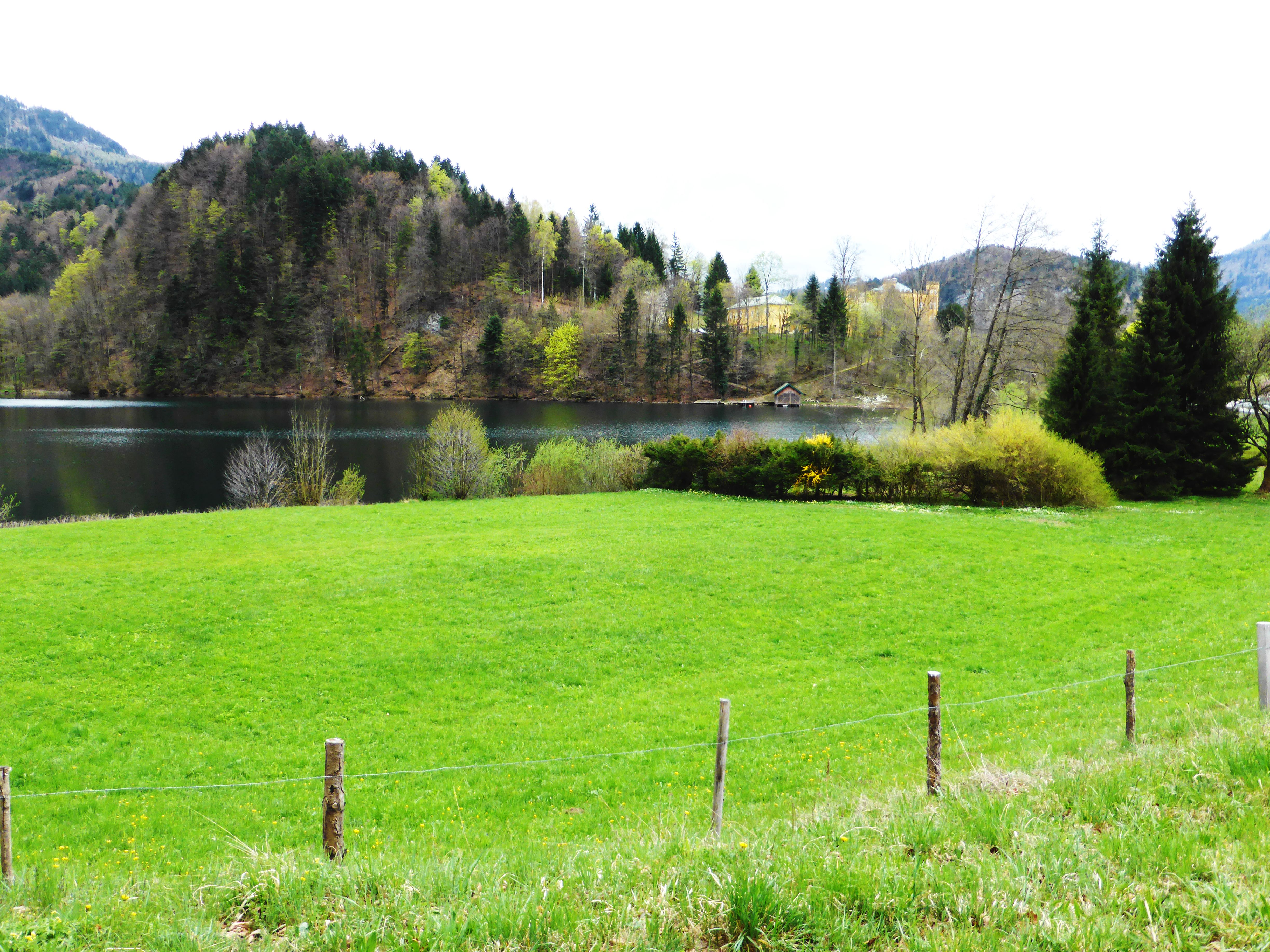 Schloss Hüttenstein (St. Gilgen) mit Krottensee